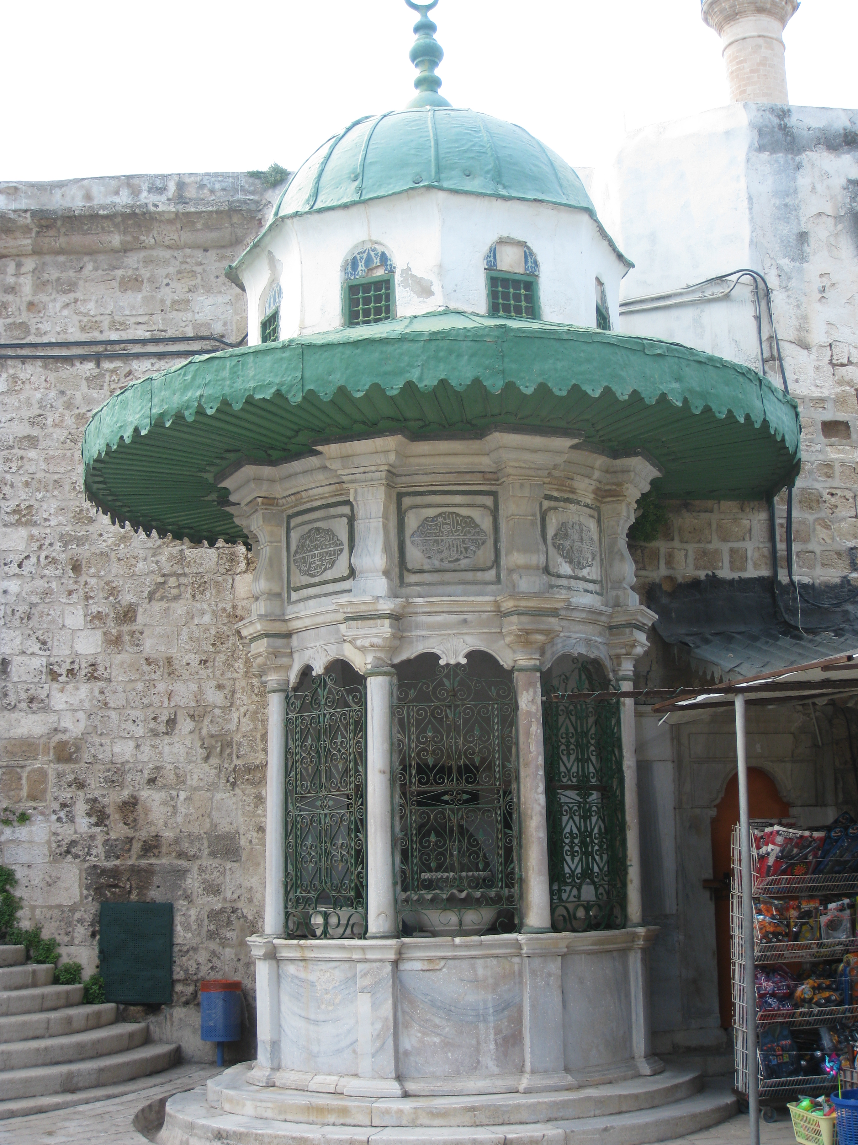 Al Jazar Mosque מסגד אל ג'זאר בעכו